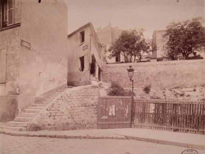 Entrée du passage Vandrezanne sur la Butte-aux-Cailles en 1900. Photo d'Eugène Atget.